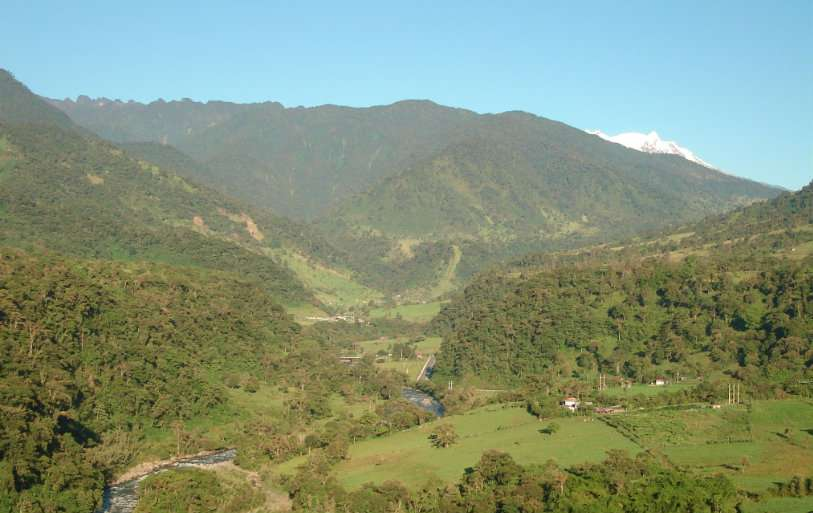 Vista panorámica de Quijos